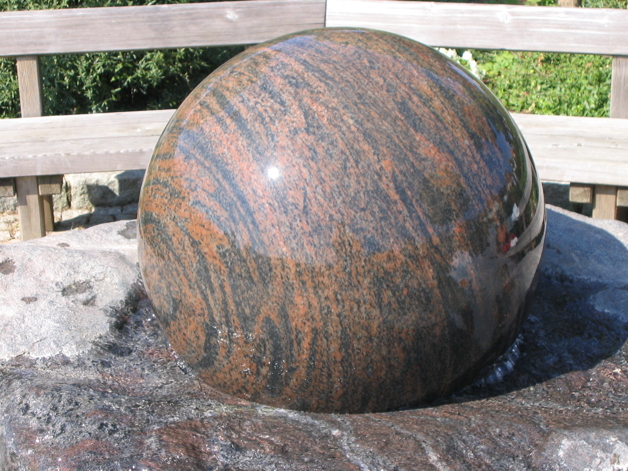 Japanischer Garten beim Schloß Bonndorf